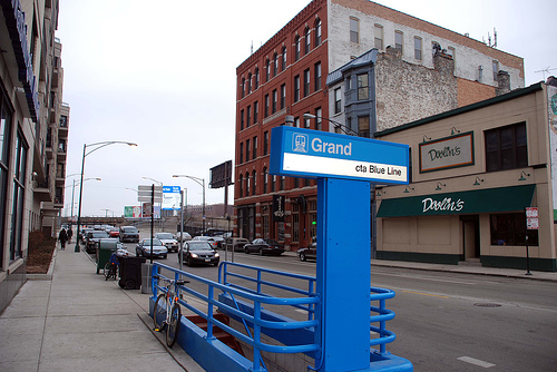 Station grand sur la bleue